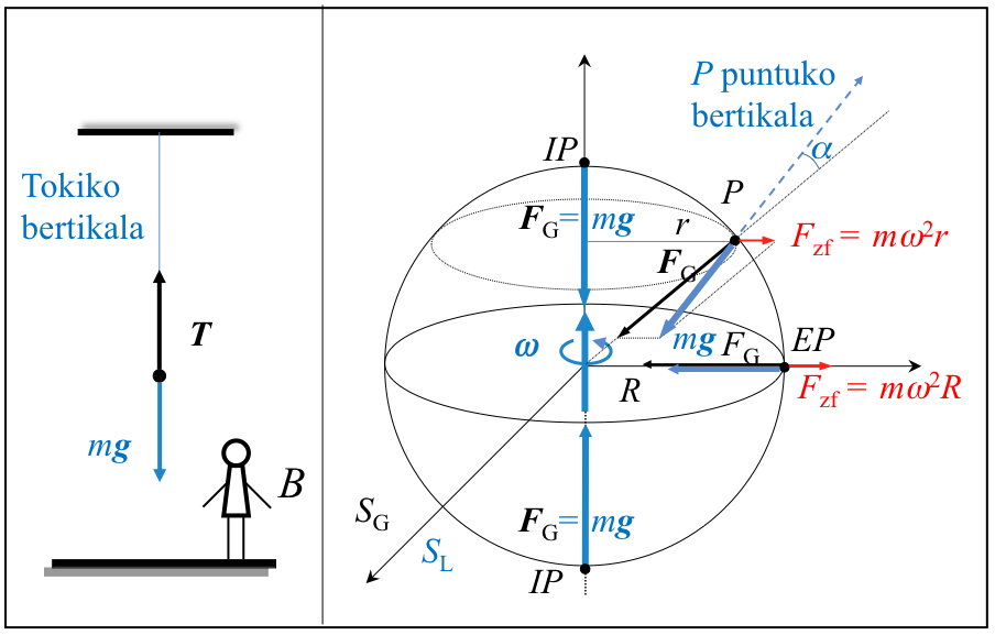 Ezkerraldean, tokiko bertikalaren, plomuaren oreka egoerako eskema ageri da. Bigarrenean, latitudeta jakin bateko puntuko bertikalaren definiziorako indarren eskema ageri da.